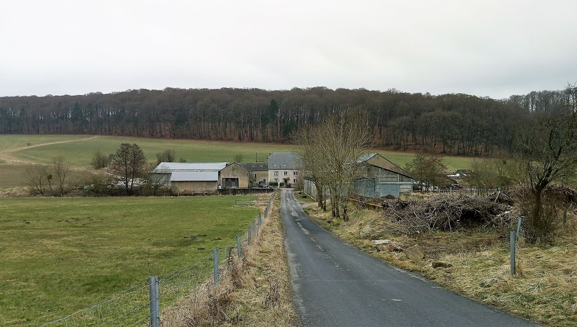 Bricherhaff, commune de Moutfort.